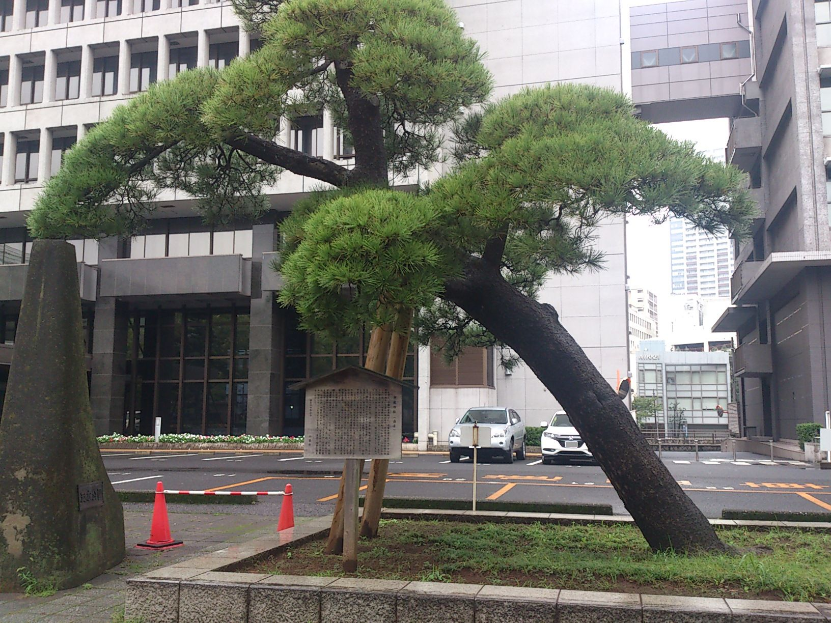 千葉市中央区にある羽衣伝説の地